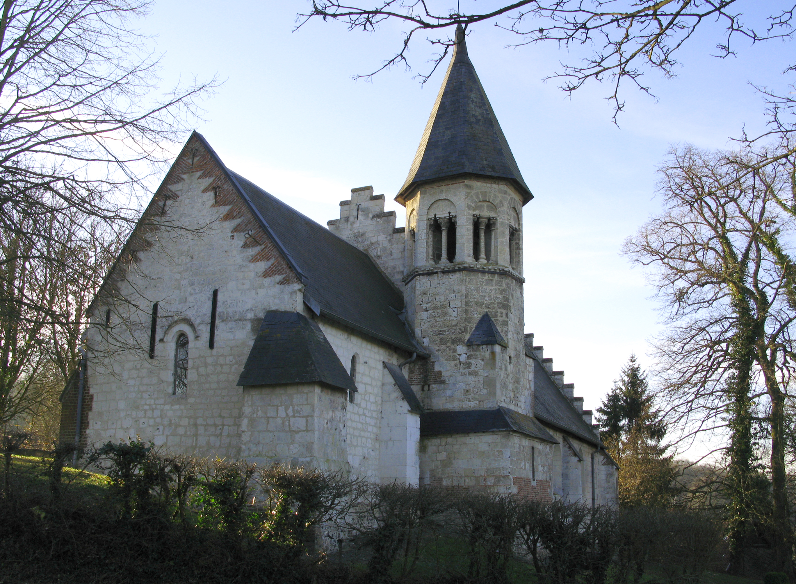 Blangy-sous-Poix (Somme, France) - L'église Saint-Médard. . .